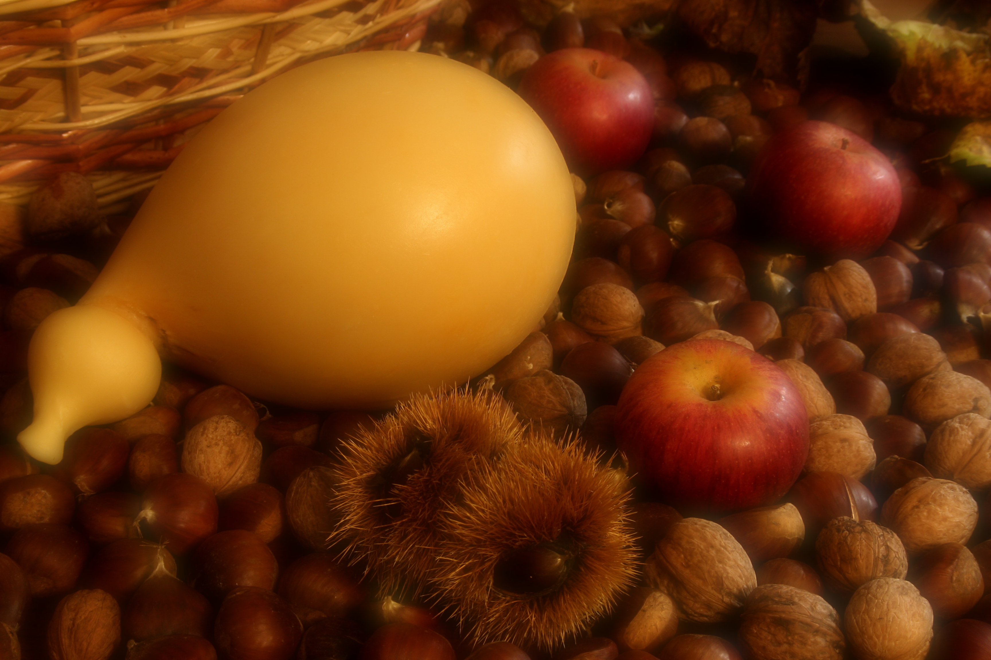 Garantisco che il formaggio era buonissimo. Almeno così ne resta il ricordo... :)